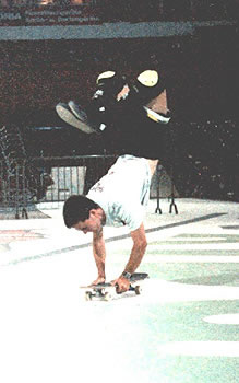 Freestyle: Parallel-handstand Foto door Hans Lucas, WK Münster 1987